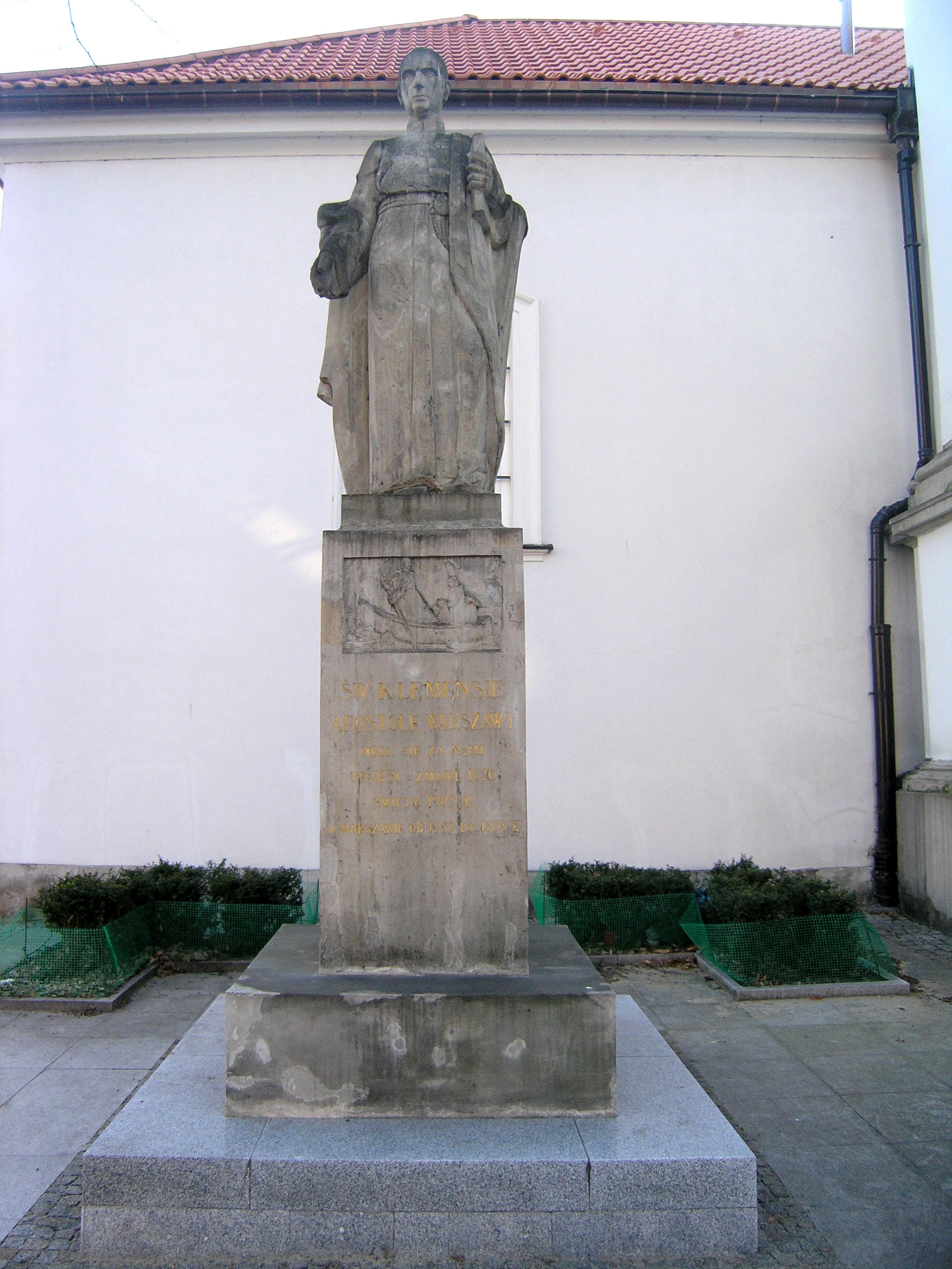 Posąg św. Klemensa Marii Hofbauera przy rynku Nowego Miasta w Warszawie, znajdujący się obok Kościoła pw. Św. Kazimierza.